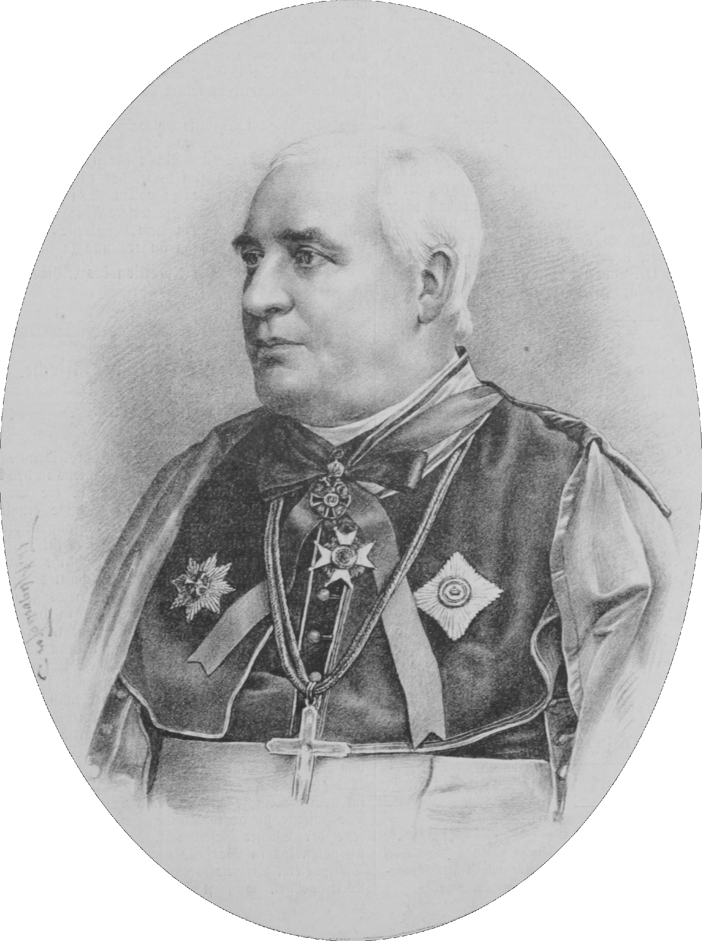 Laurenz Mayer (1828–1912), Austrian priest